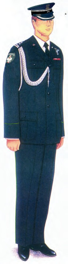 Ubiór galowy funkcjonariuszy noszących umundurowanie Sił Powietrznych z mundurem wyjściowym noszonym ze sznurem galowym oraz z czapką garnizonową.